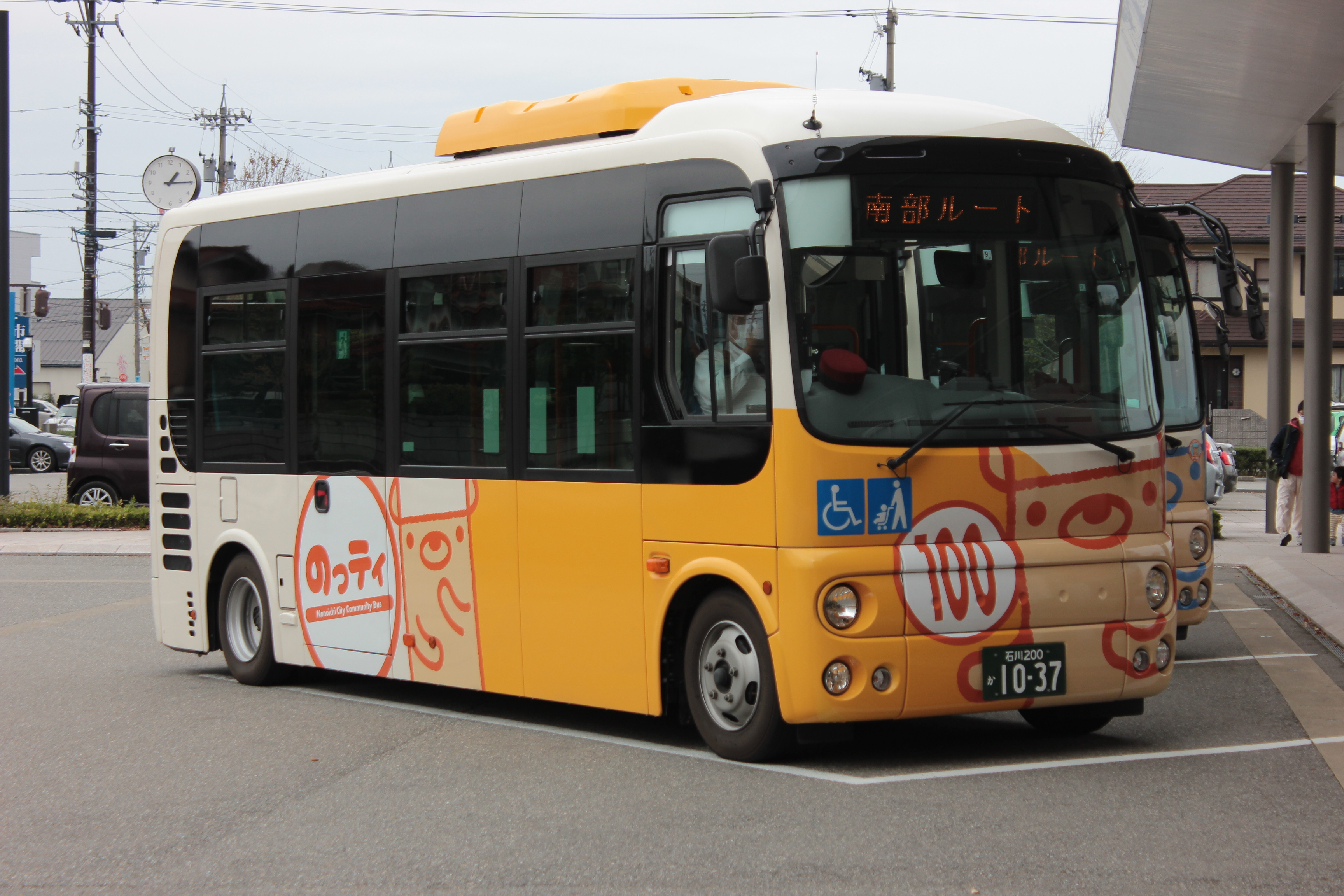 のっティ（野々市市役所前にて） Canon EOS Kiss X5